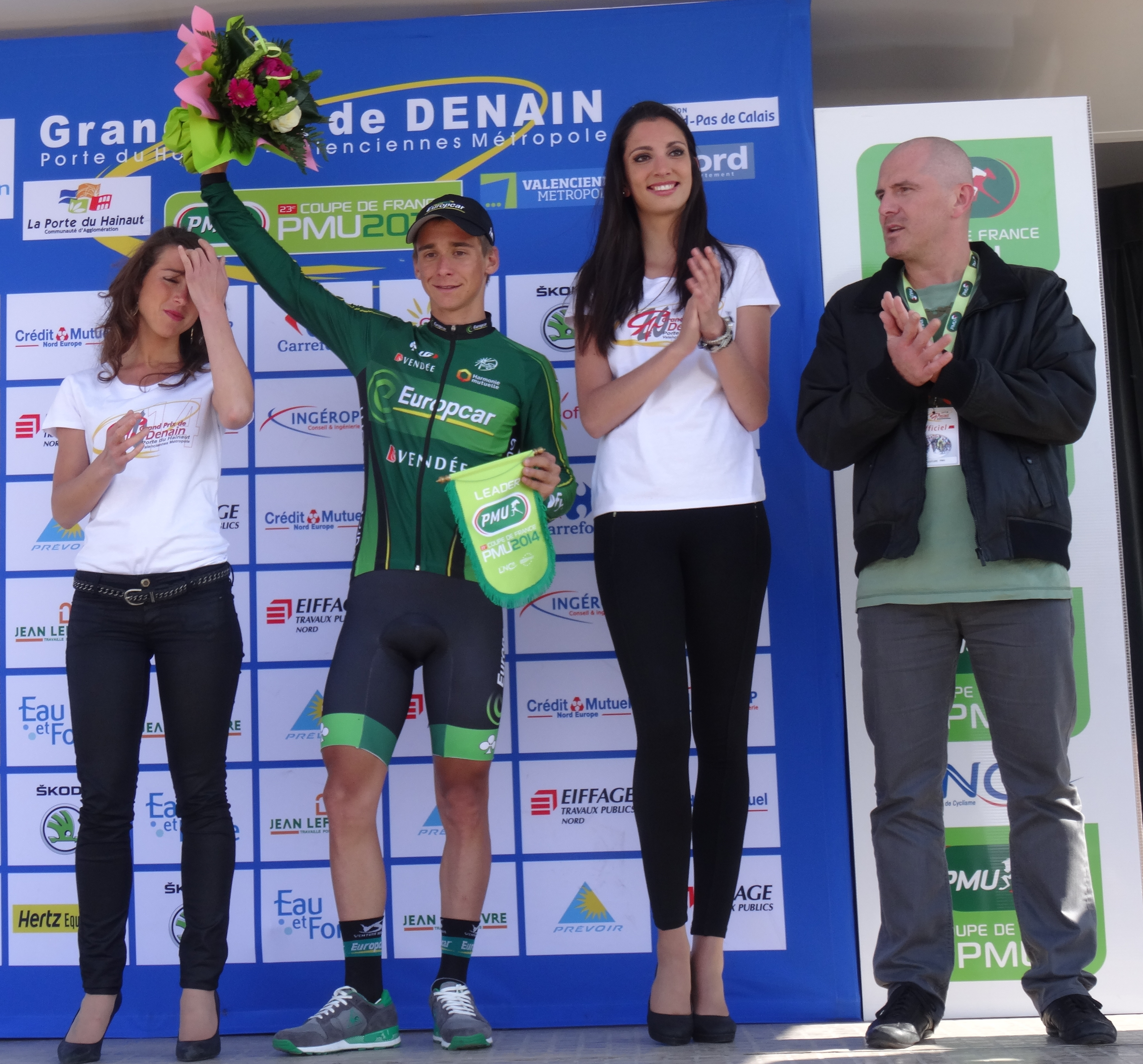 Reportage réalisé le jeudi 17 avril à l'occasion du départ et de l'arrivée du Grand Prix de Denain 2014 à Denain, Nord, Nord-Pas-de-Calais, France.